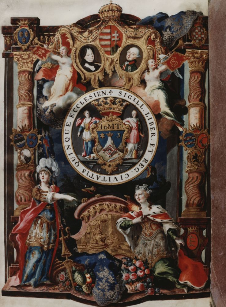 Pécs város címere a 18. században